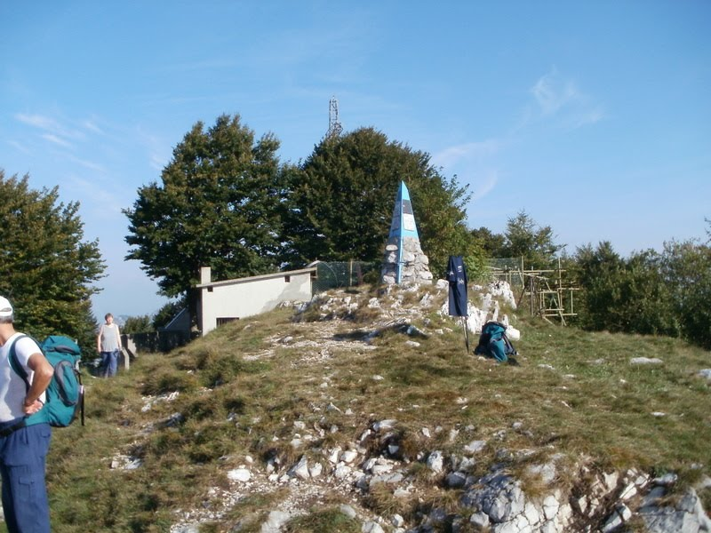 Sacrario presso il monte Tesoro, Carenno (LC)